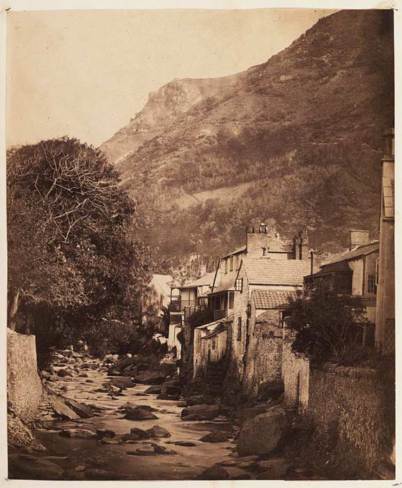 Ffotograffydd/Photographer: Possibly Calvert Richard Jones (1804-1877) Dyddiad/Date: 185- Cyfeiriad/Reference: viv00140 (pb02376/77) Rhif cofnod / Record no.: 3590001 Rhagor o wybodaeth am Ffotograffiaeth Gynnar Abertawe yn Llyfrgell Genedlaethol Cymru More information about Early Swansea Photography at the National Library of Wales